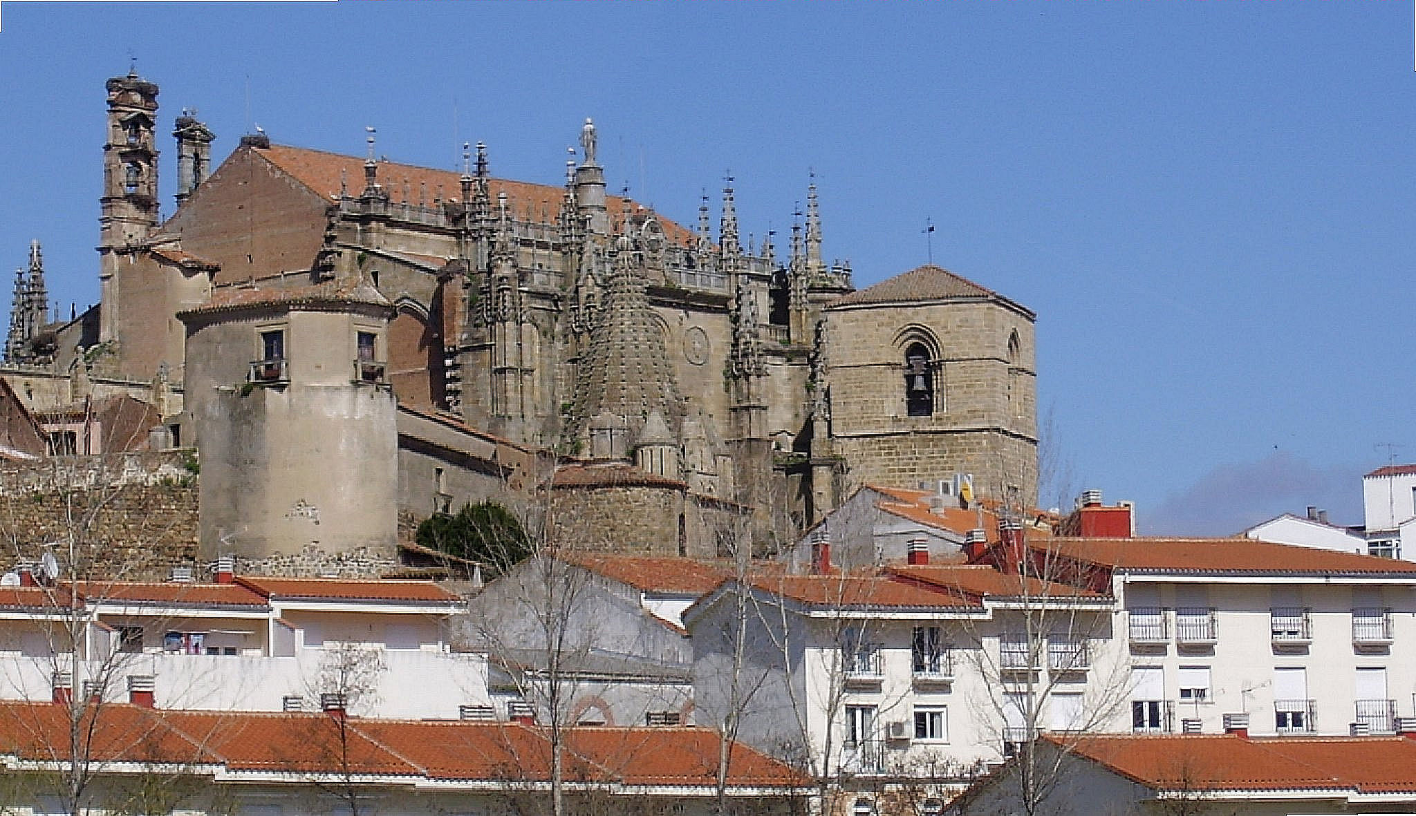 PLASENCIA.